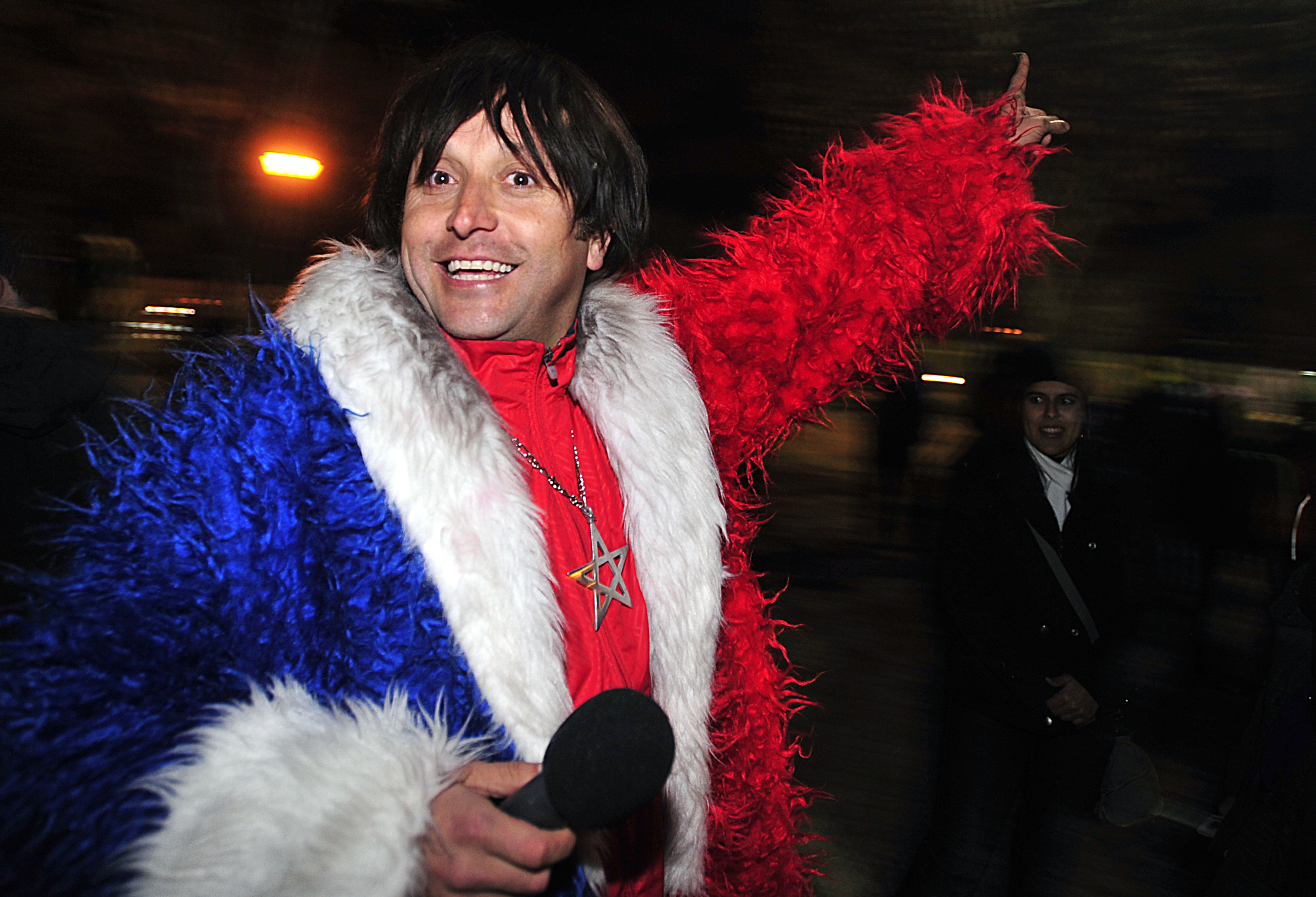 Joanesburgo - Torcida chilena vê sua seleção ser derrotada pelo Brasil.